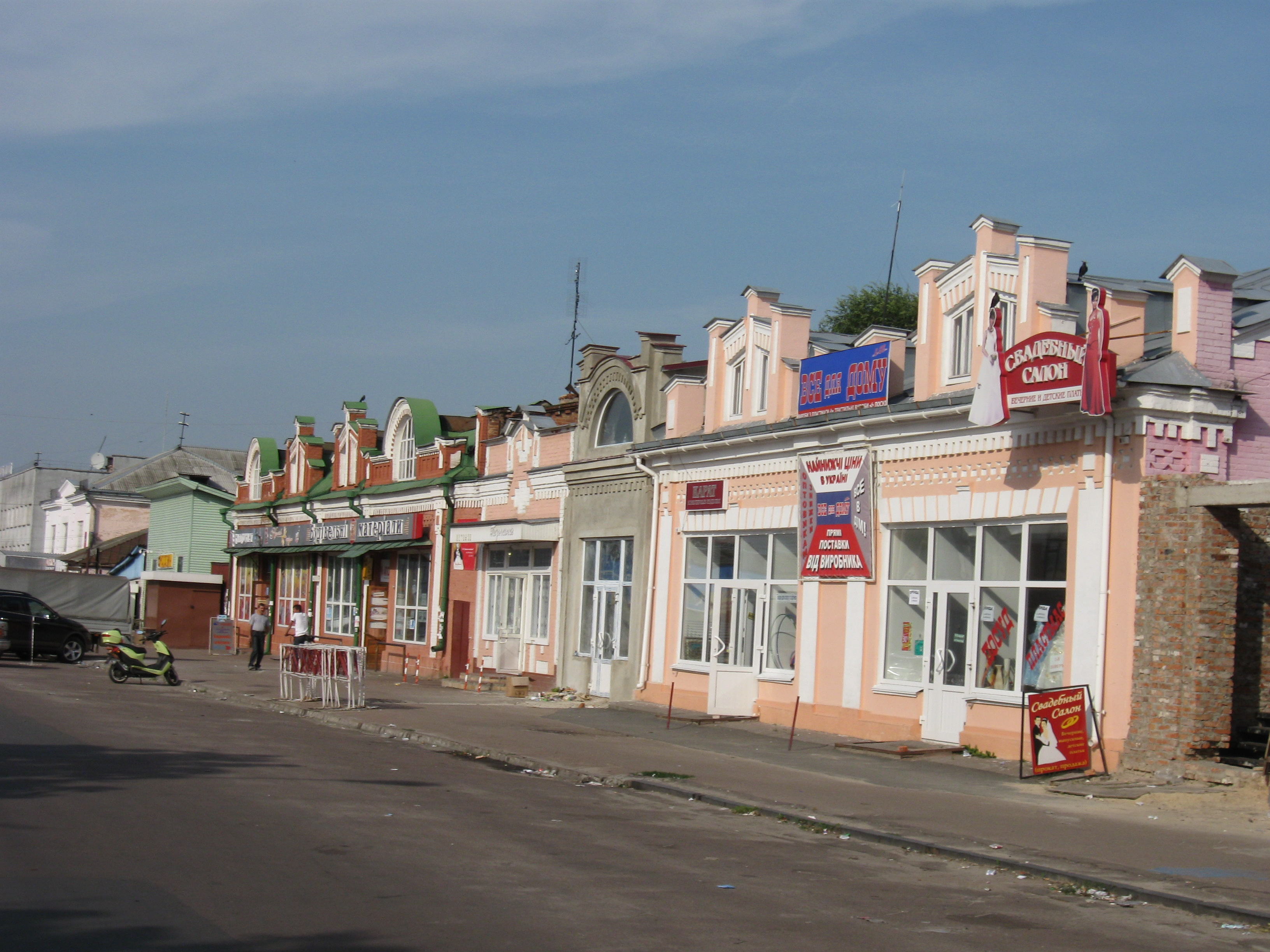 Торгові ряди на вул. Я. Батюка в Ніжині на Чернігівщині